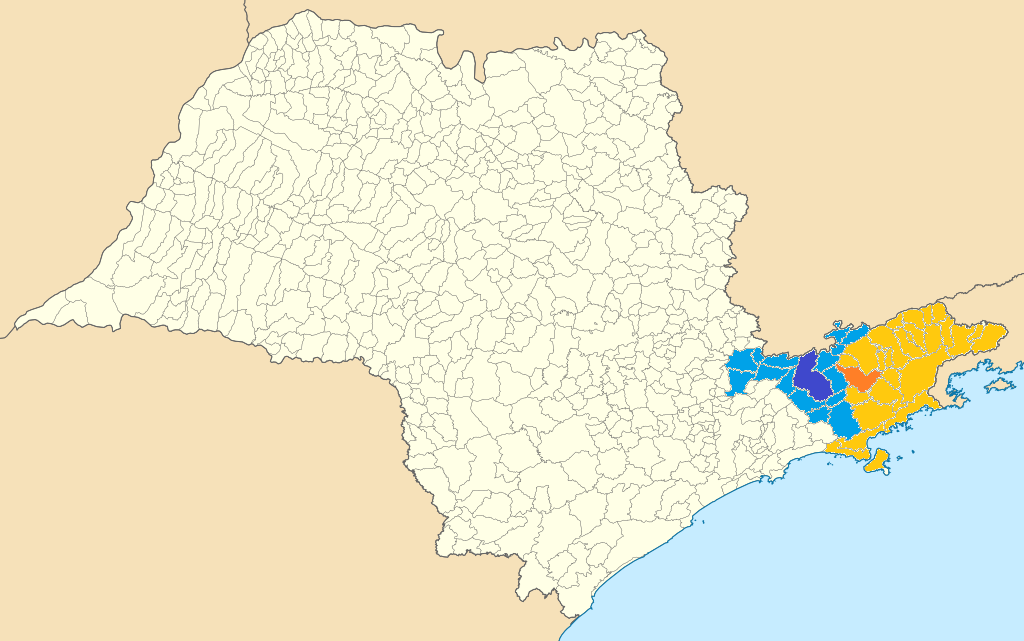 Mapa da cobertura da Rede Vanguarda Azul: TV Vanguarda São José dos Campos Laranja: TV Vanguarda Taubaté